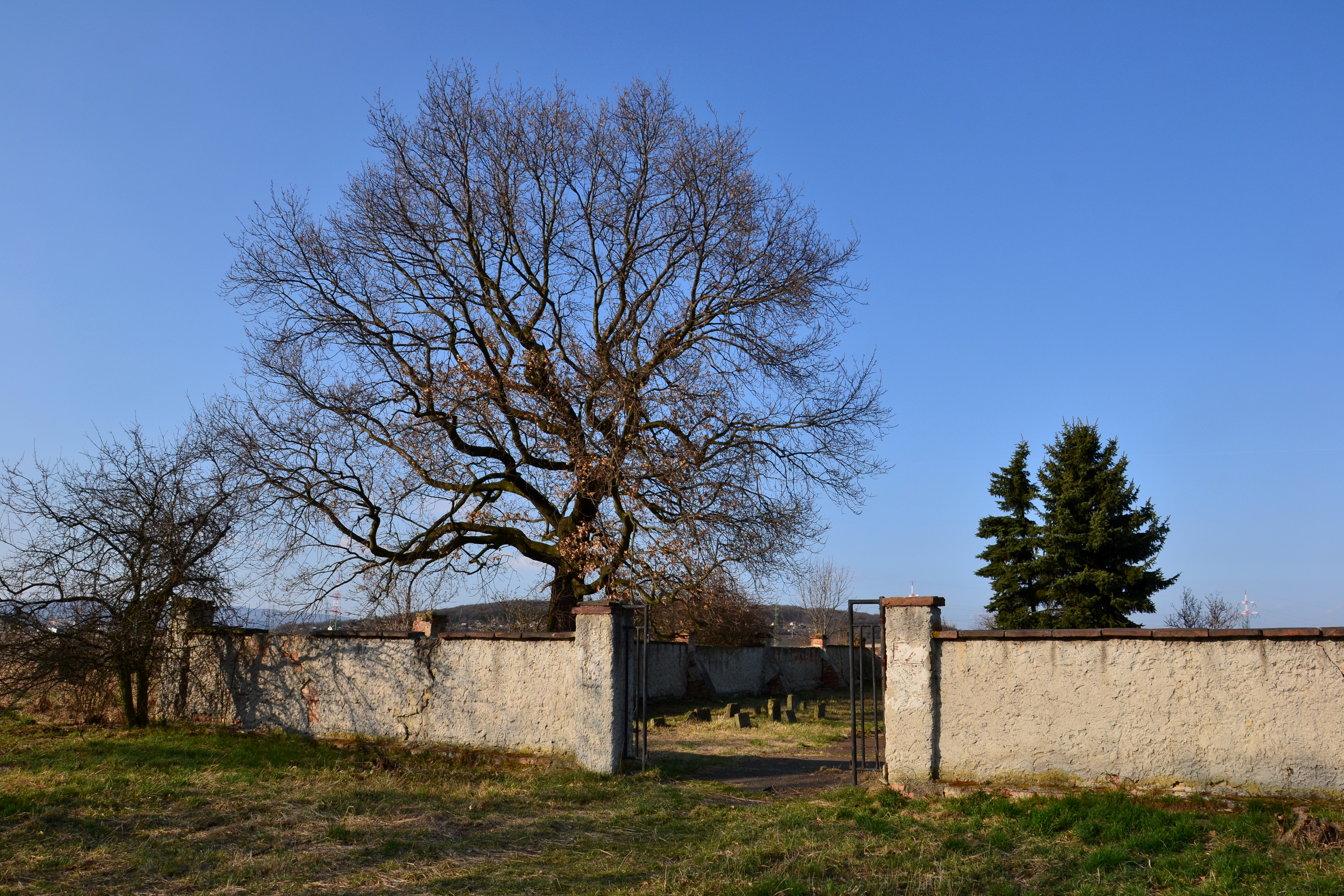 Nový židovský hřbitov - brána